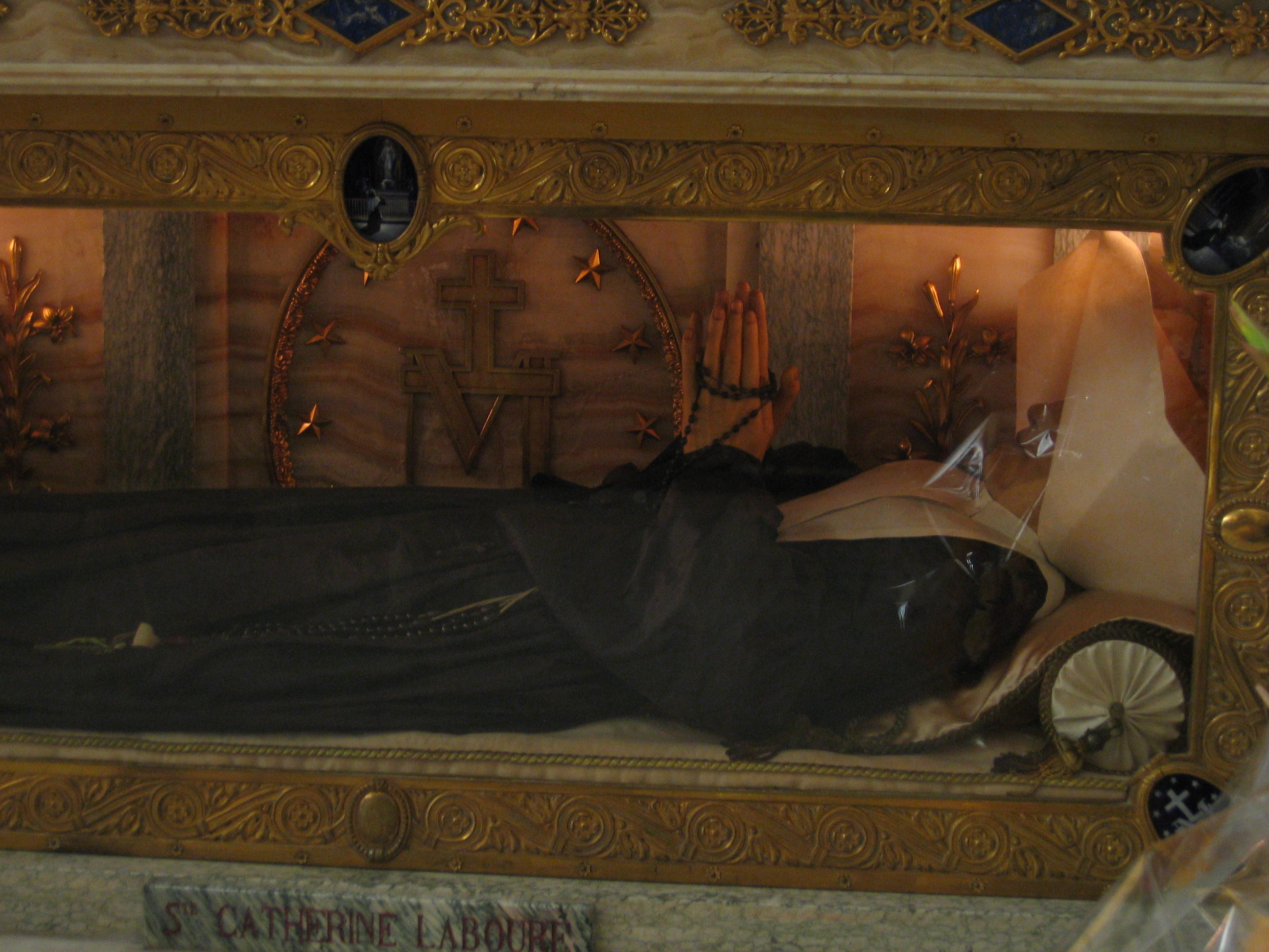 Leichnam der Hl. Katharina Labouré in der Rue du Bac, Paris